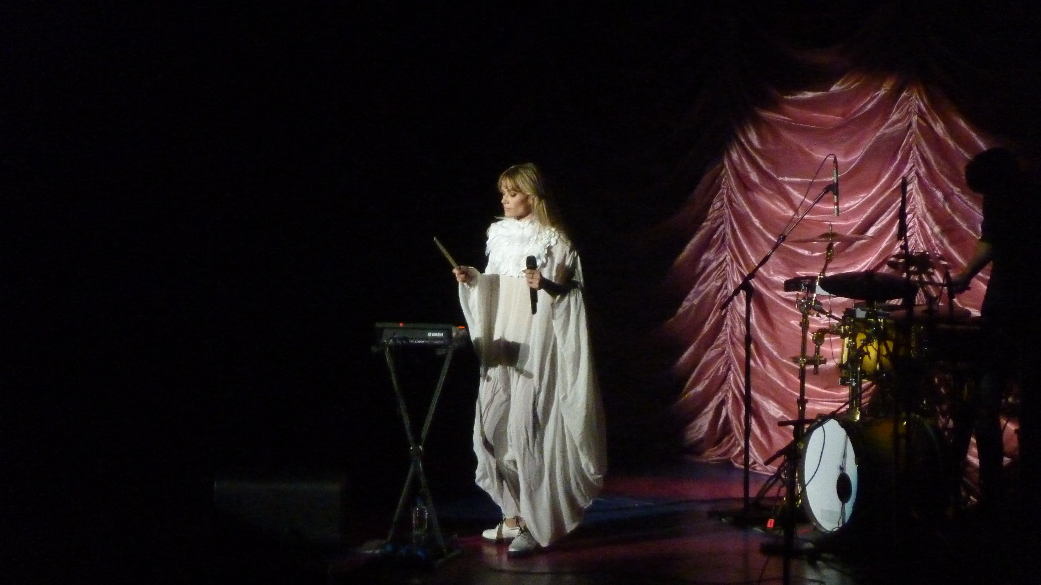 Oh Land